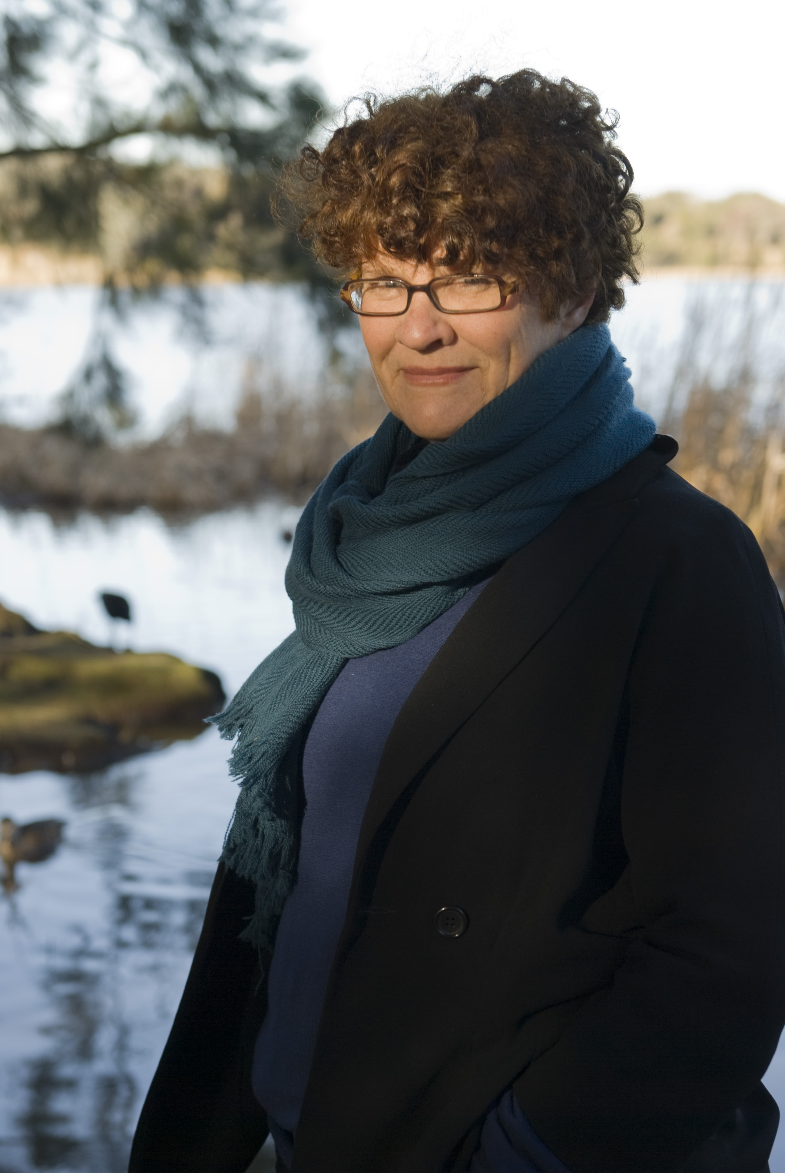 File:Kate Grenville-credit-Darren James-web.jpg Kate Grenville-credit-Darren James-web